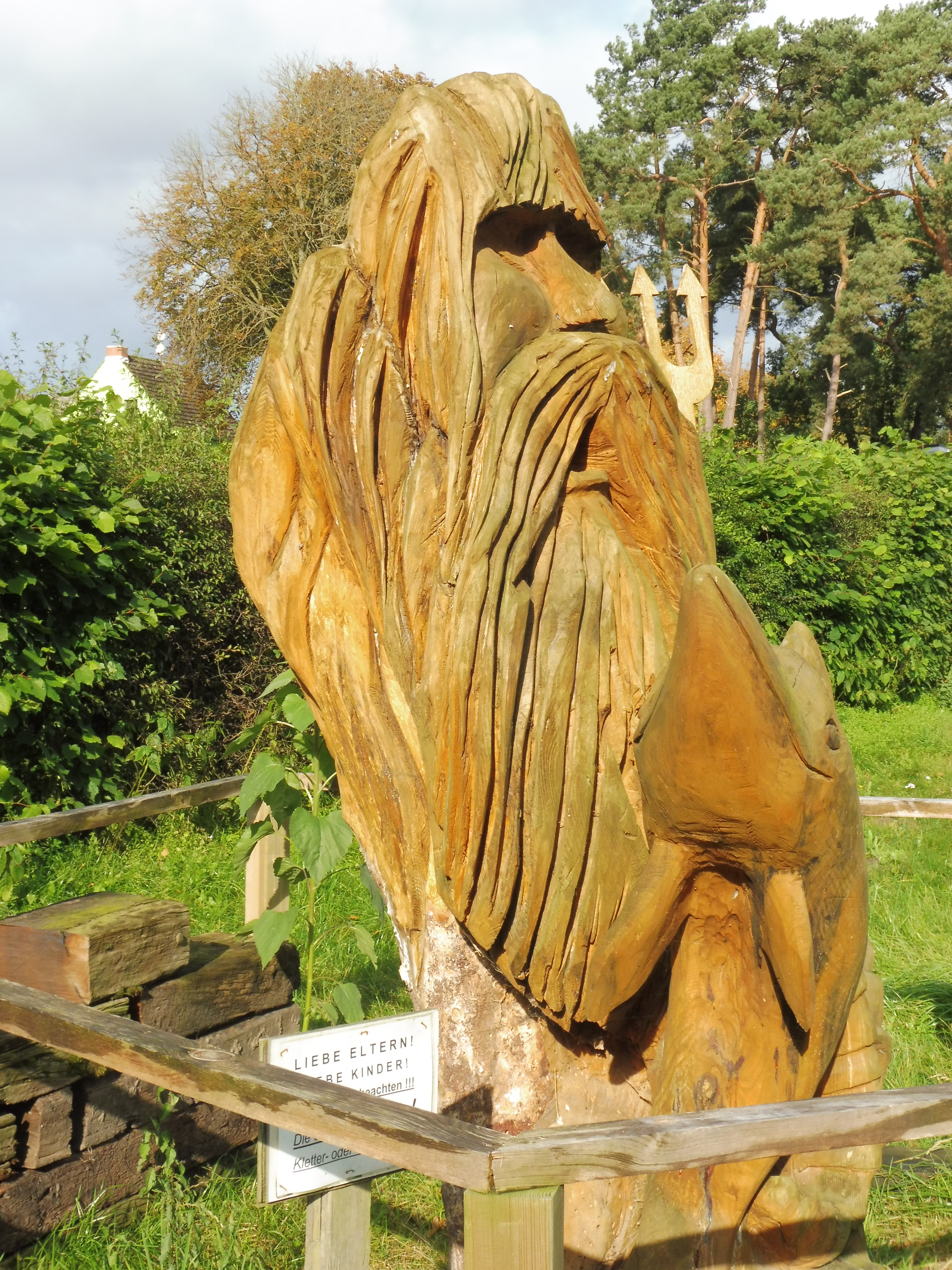 Holzschnitzerei Neptun in Quetzin (Plau am See)